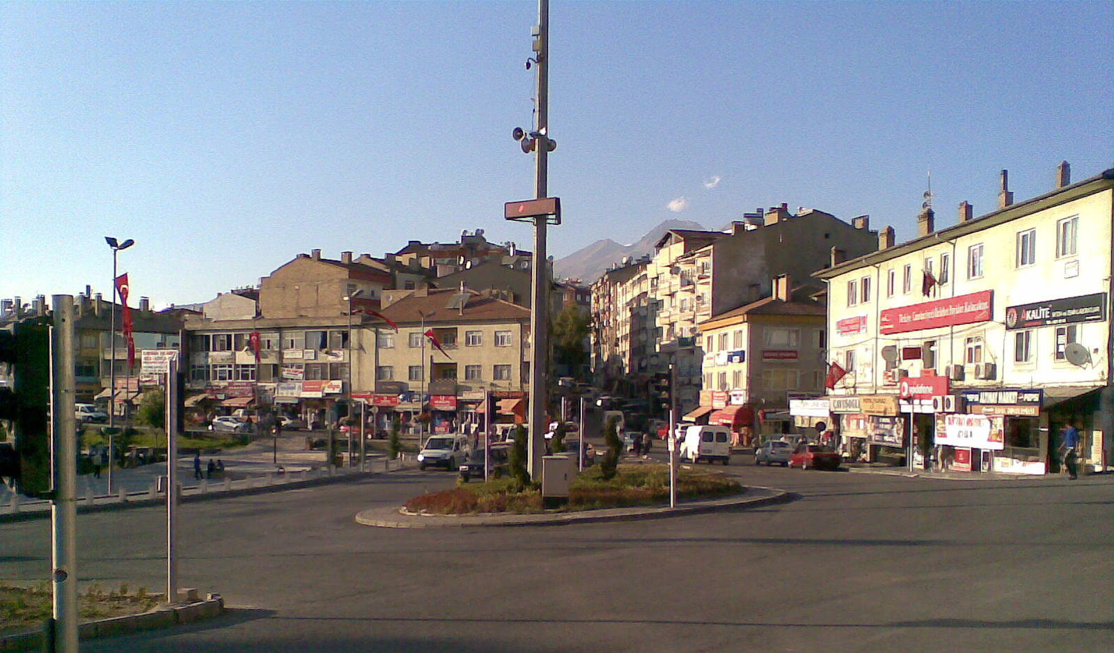 Zentraler Platz Cumhuriyet Meydanı in Develi, Zentraltürkei